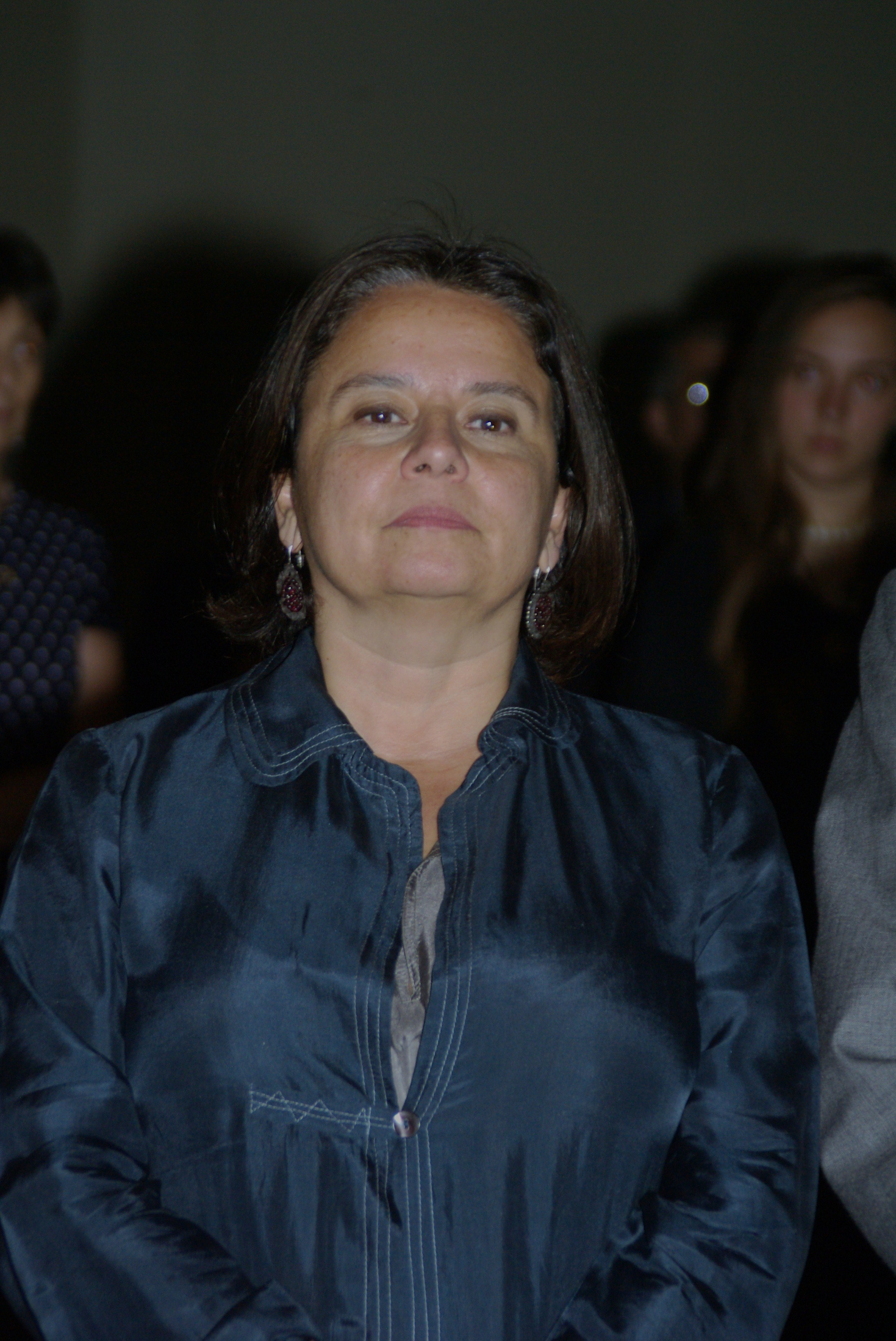 Claudia Barattini, ministra de Cultura de Chile en la inauguración de la exposición de José Gil de Castro el 1 de abril de 2015 en Santiago, en el Museo Museo de Bellas Artes de Chile